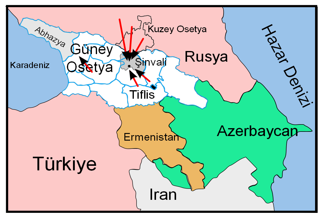 Mapa de referencia de la invasion a Osetia del Sur